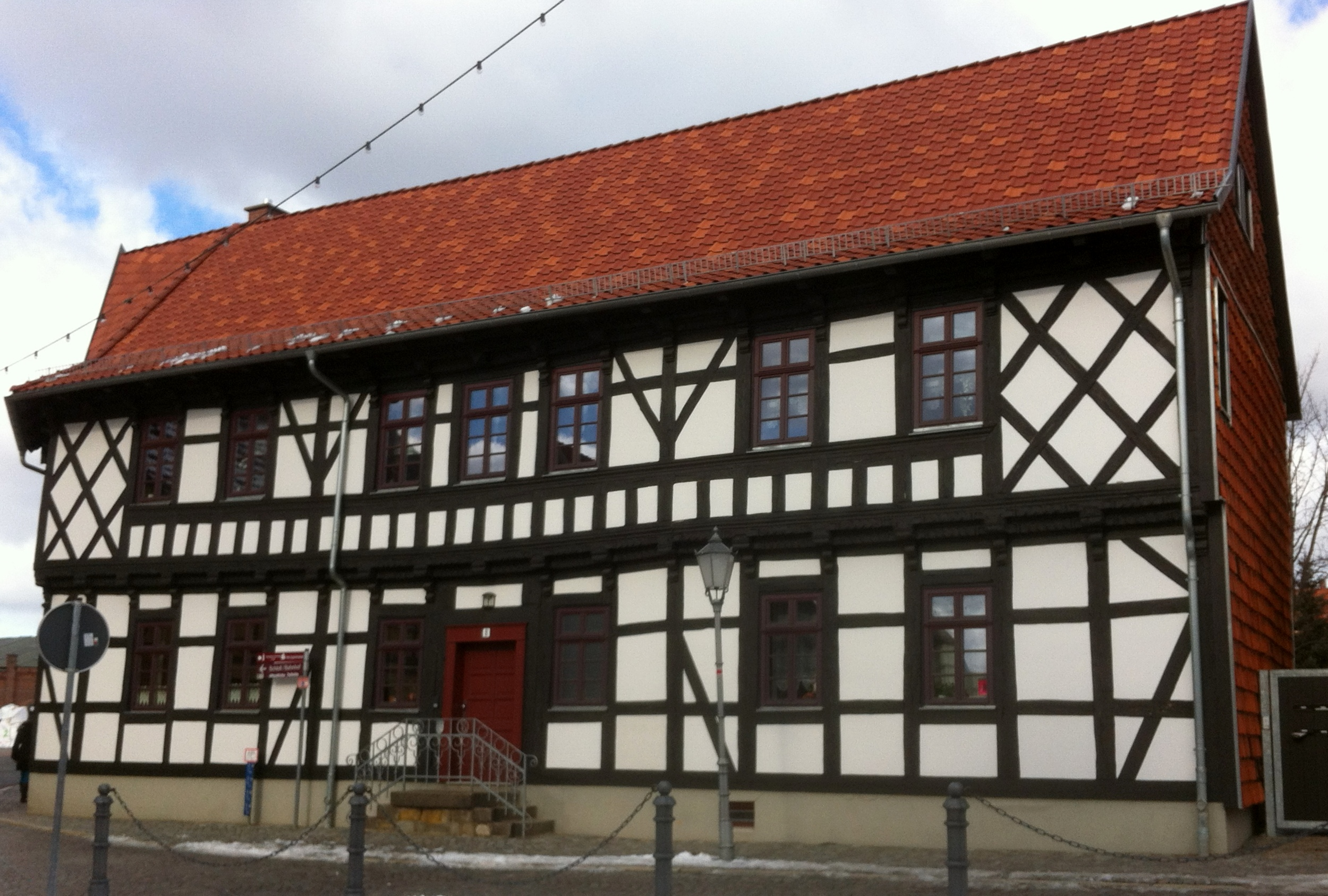 Haus Marktplatz 8 in Harzgerode